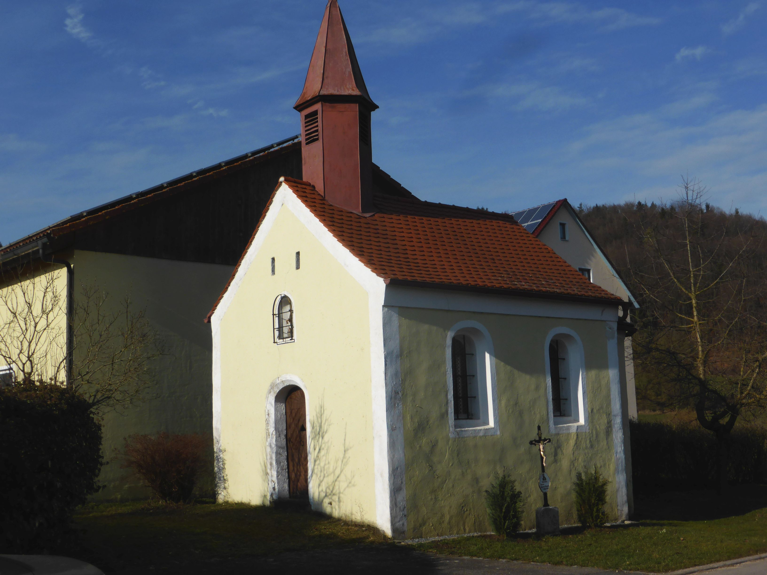 Hofkapelle Dreifaltigkeit in Holzheim (Hohenfels)